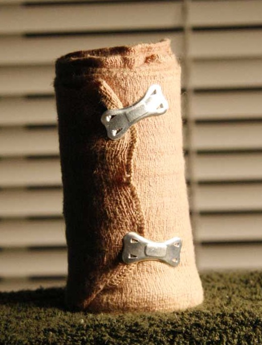 Bandage